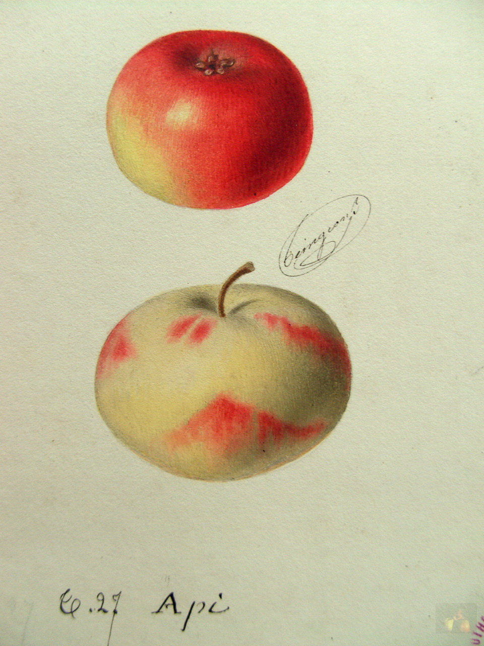 Api (pomme), Pomme d'Api, Lady Apple...